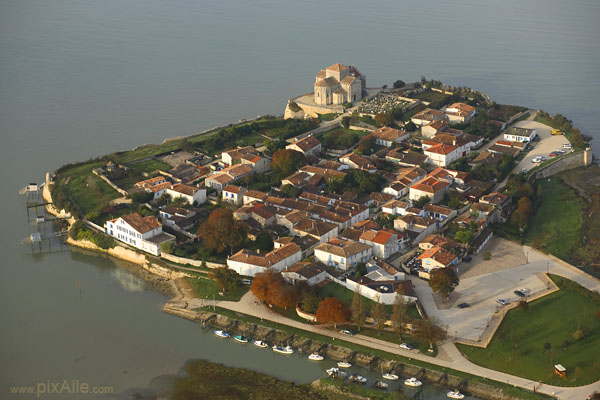 Vue aérienne oblique de l'ancienne bastide sur la presqu'île entourée par l'Estuaire de la Gironde